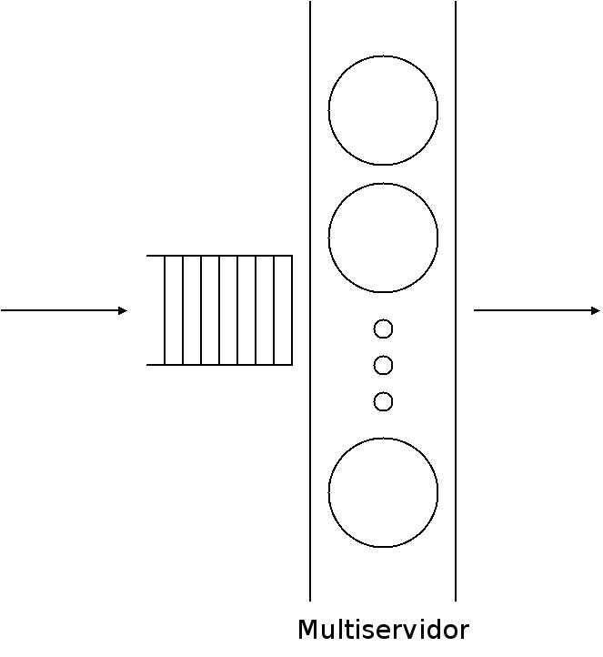 Multiservidor